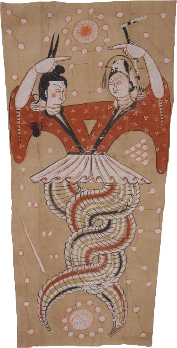 唐《伏羲女娲图》 （绢本，设色） 纵184厘米，上宽85厘米、下宽75厘米 1967年吐鲁番市阿斯塔那76号墓出土